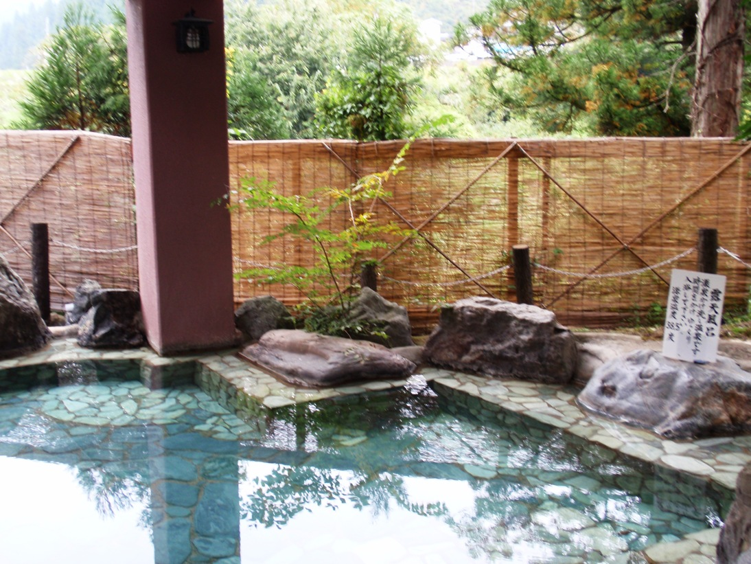 新潟県折立温泉ホテルゆのたに荘露天風呂